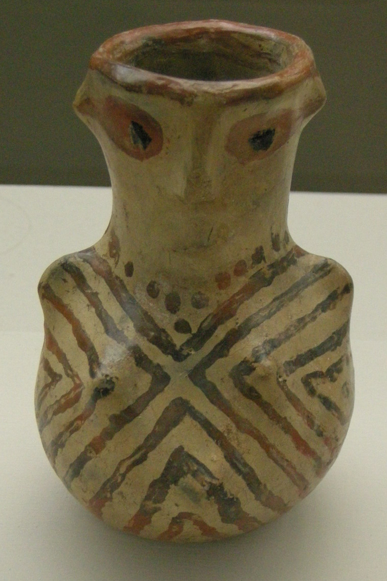 Archeologico firenze, vasetto antropomorfo, 5250-5000 a.c., da hacilar (turchia) 0